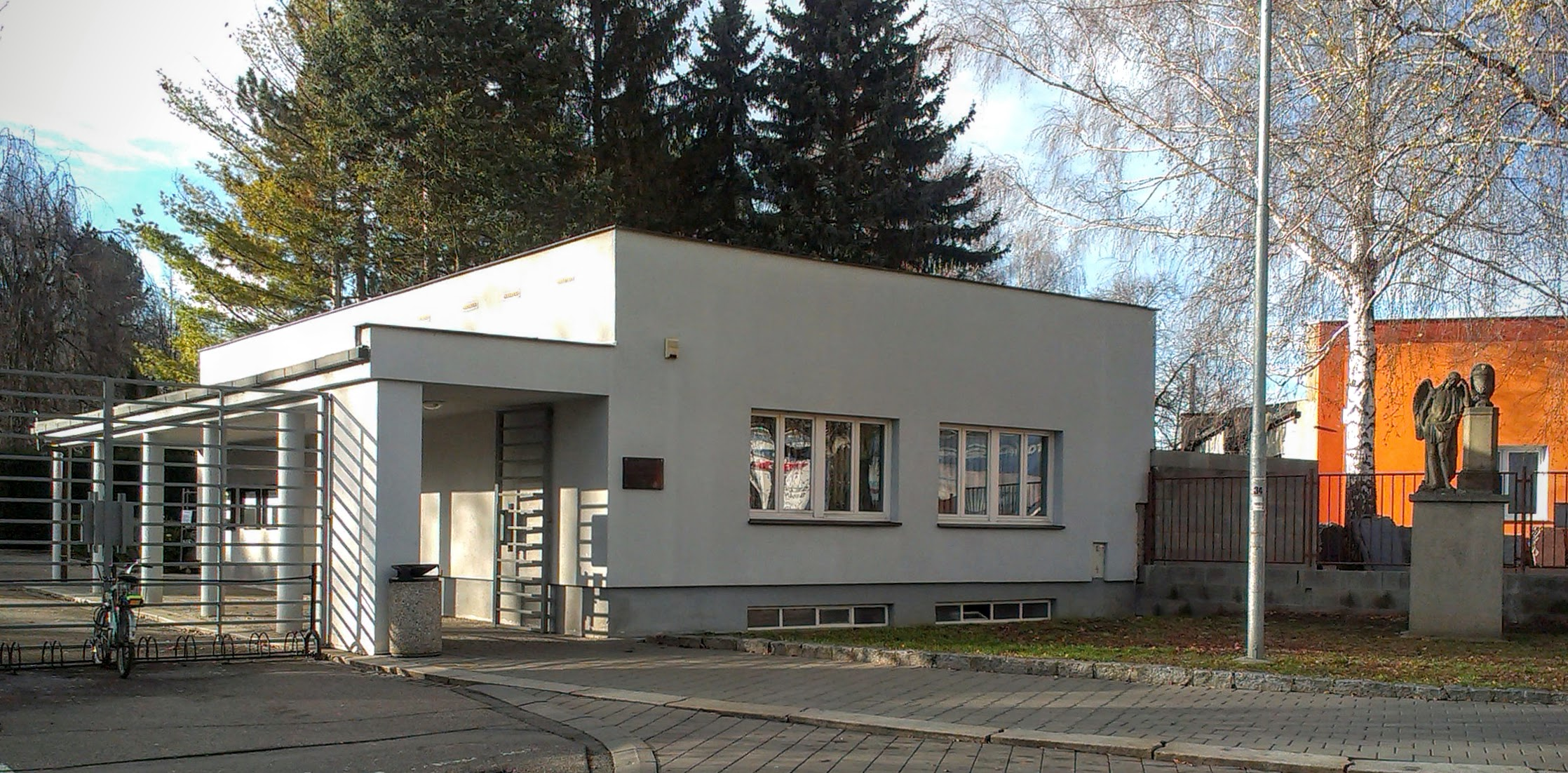 Vstupní objekt kroměřížského hřbitova postavený podle projeku Ing. arch. Jana Zavřela z roku 1934 (na budově je umístěna jeho pamětní deska)